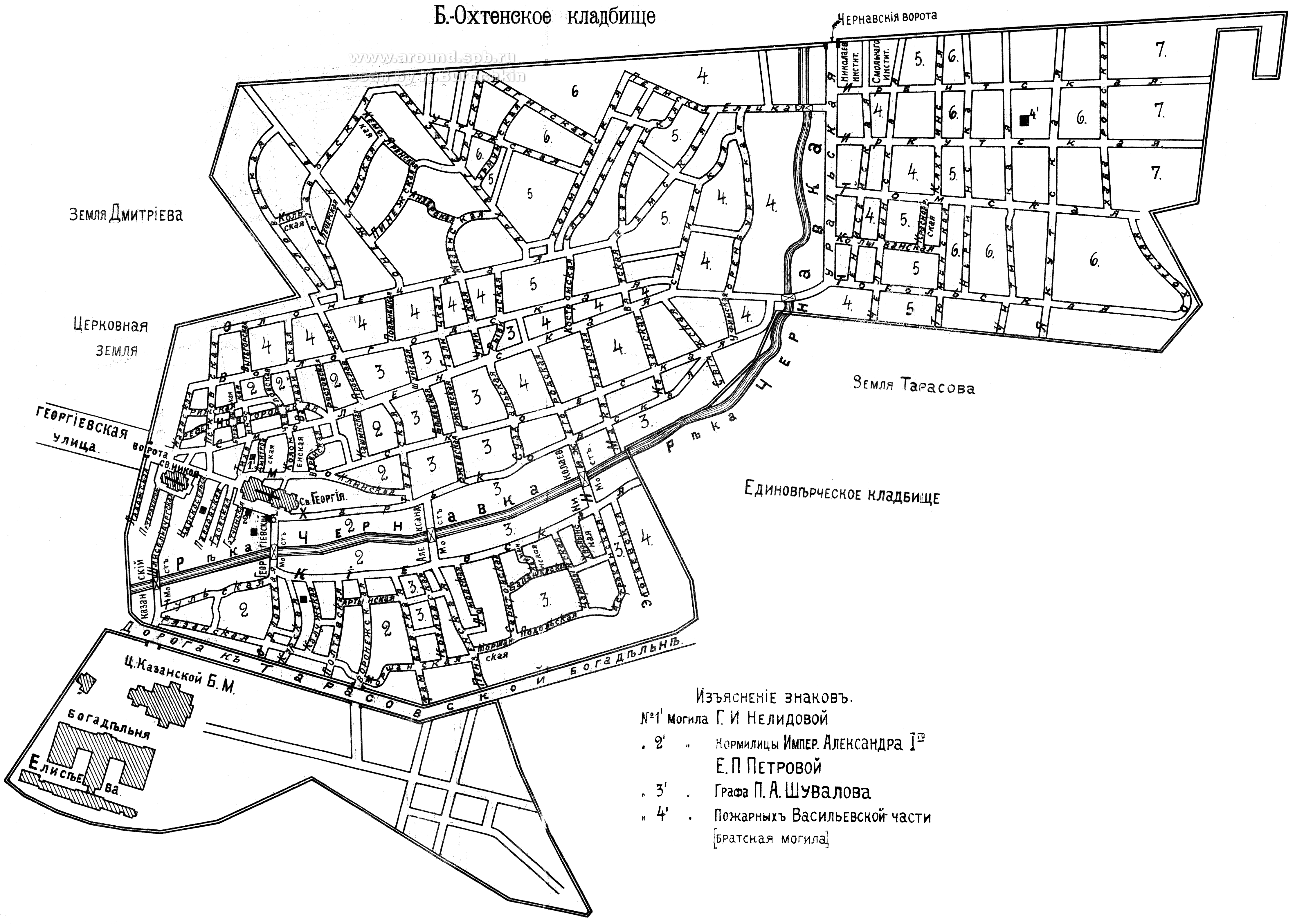 План Большеохтенского (Георгиевского) кладбища 1914 год